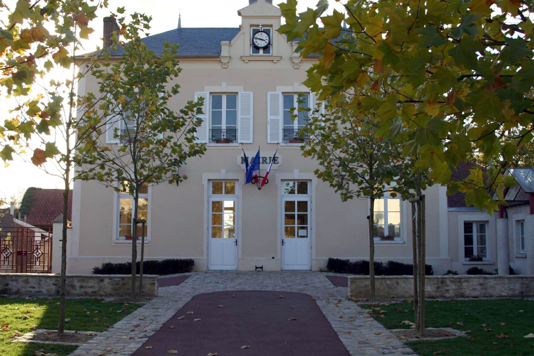 Mairie d'Orvilliers - Yvelines (France)